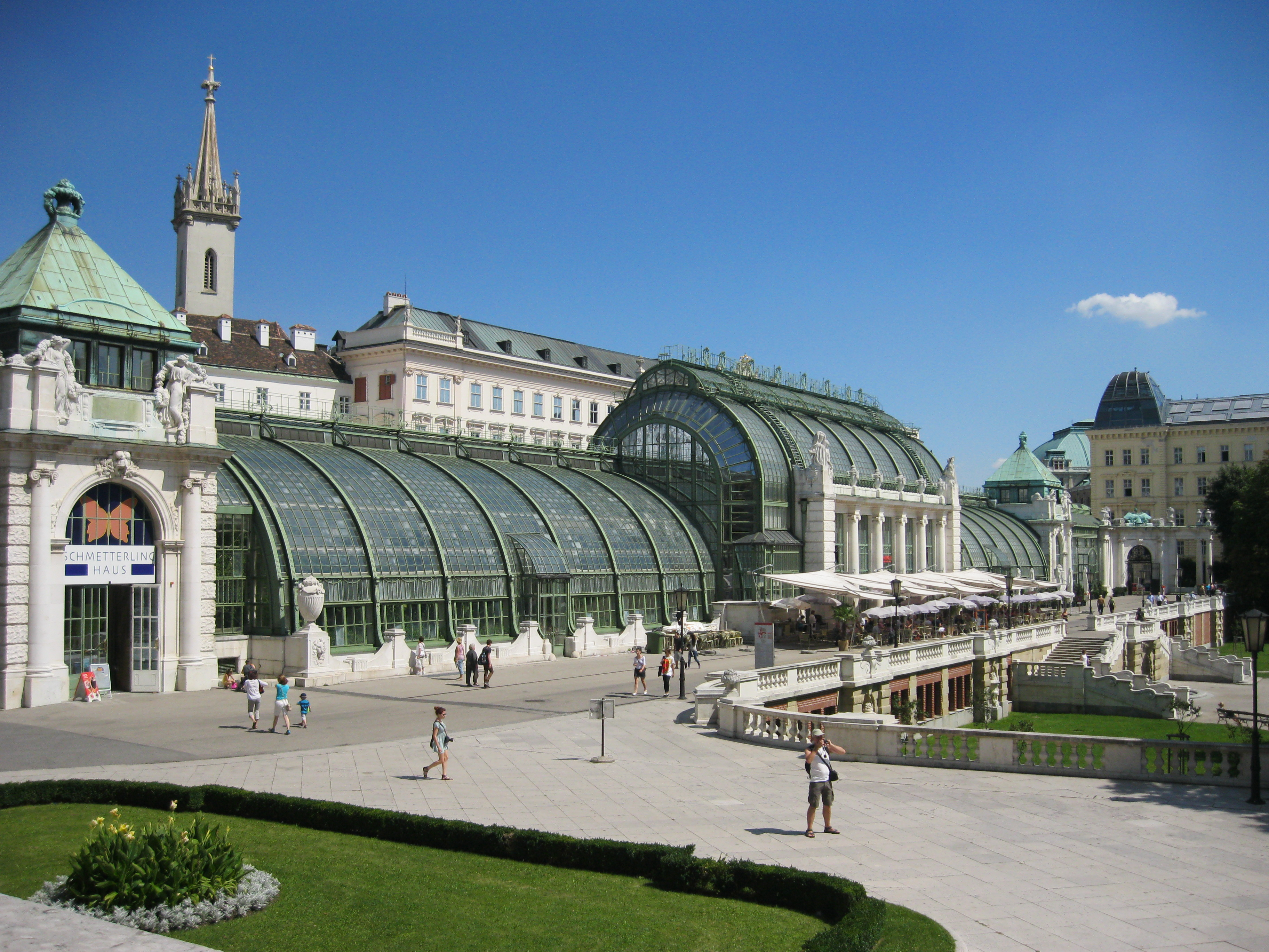 Palmenhaus, burggarten Wien Object location48° 12′ 18″ N, 16° 22′ 01″ E